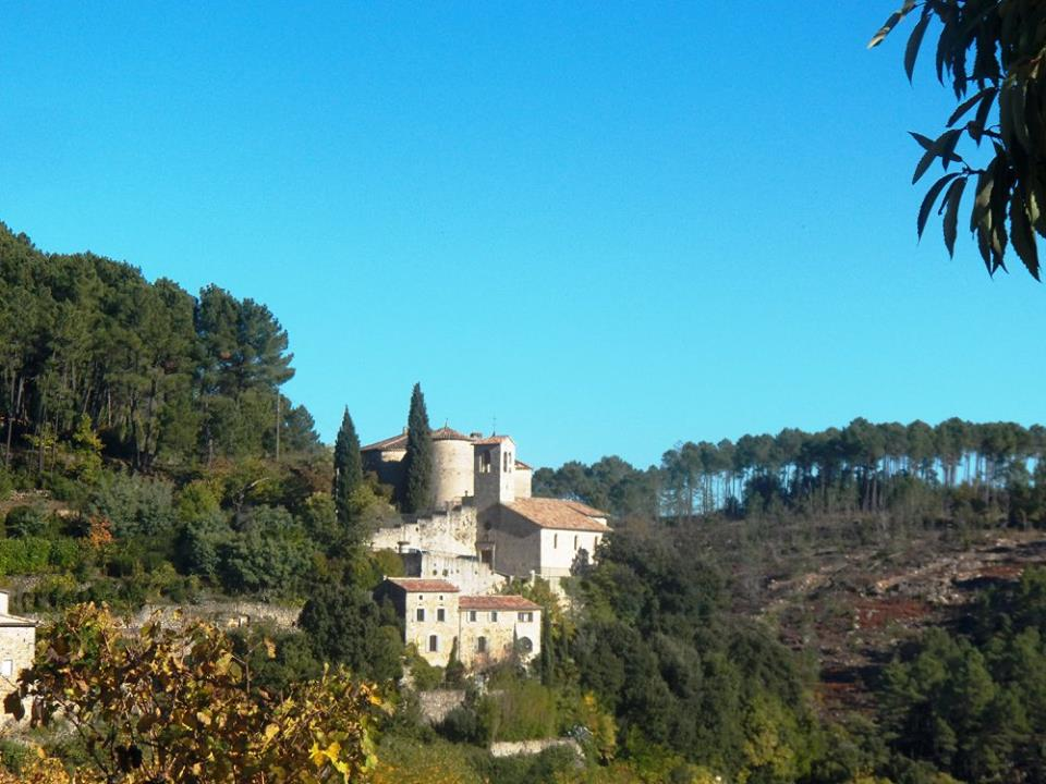 Chateau et église de Vernon en Ardèche.